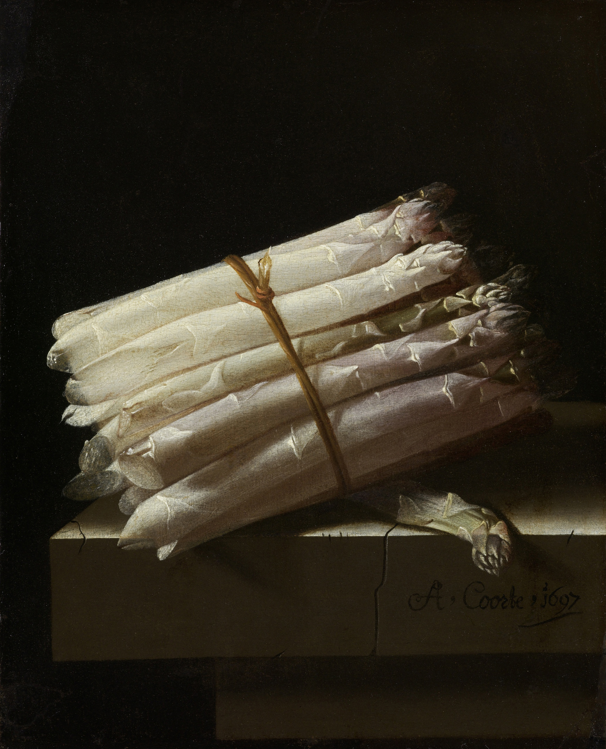 Stilleven met een bosje asperges.